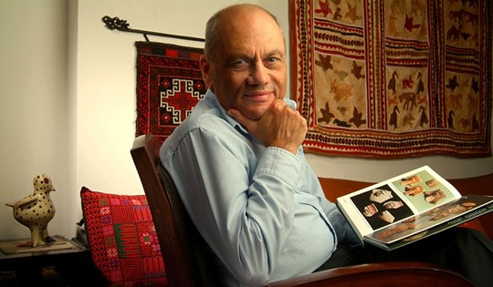 פרופסור לארכיאולוגיה אפרים שטרן